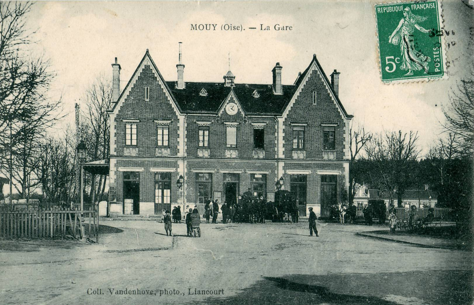 Carte postale ancienne éditée par Vandenhove à LiancourtMOUY : La Gare